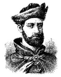 Rákóczi Zsigmond erdélyi fejedelem portré